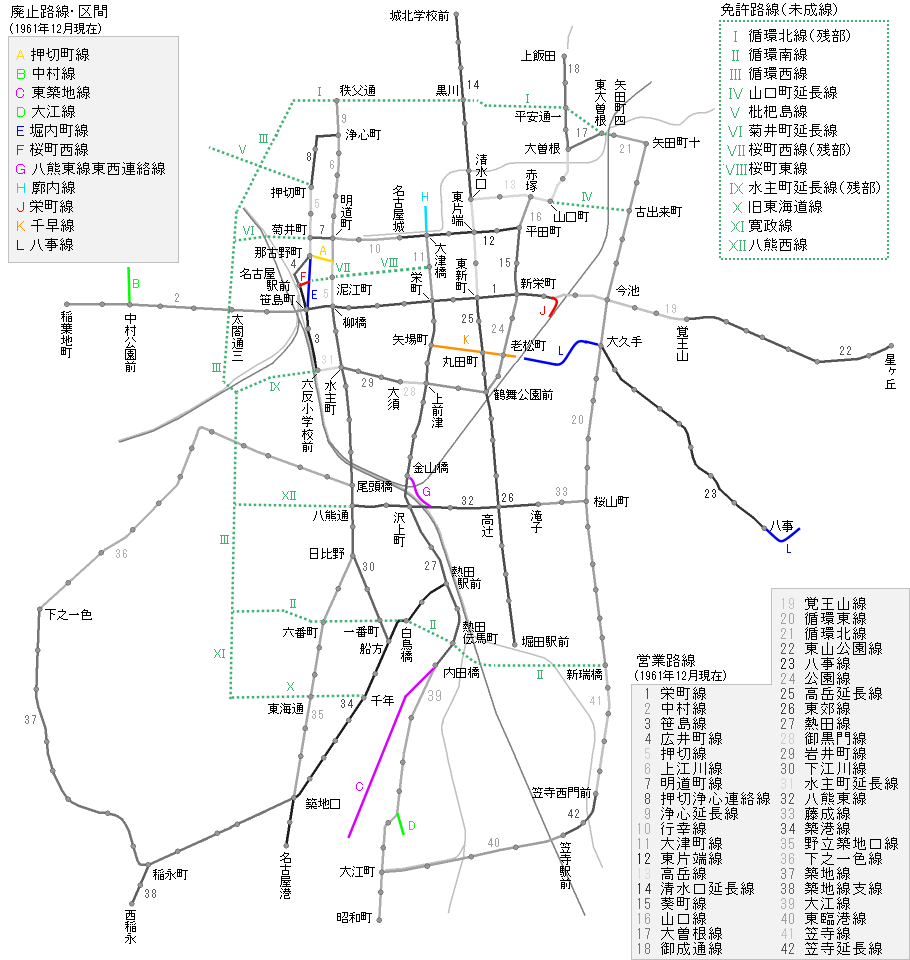 1961年12月1日時点で廃止されていた名古屋市電の区間および未成線。参考文献： 今尾恵介（監修） 『日本鉄道旅行地図帳』7号（東海）、新潮社、2008年。ISBN 978-4-10-790025-8。 名古屋市交通局（編） 『市営三十年史』 名古屋市交通局、1952年。 『官報』1928年4月14日 『地方鉄道及軌道一覧. 昭和18年4月1日現在』